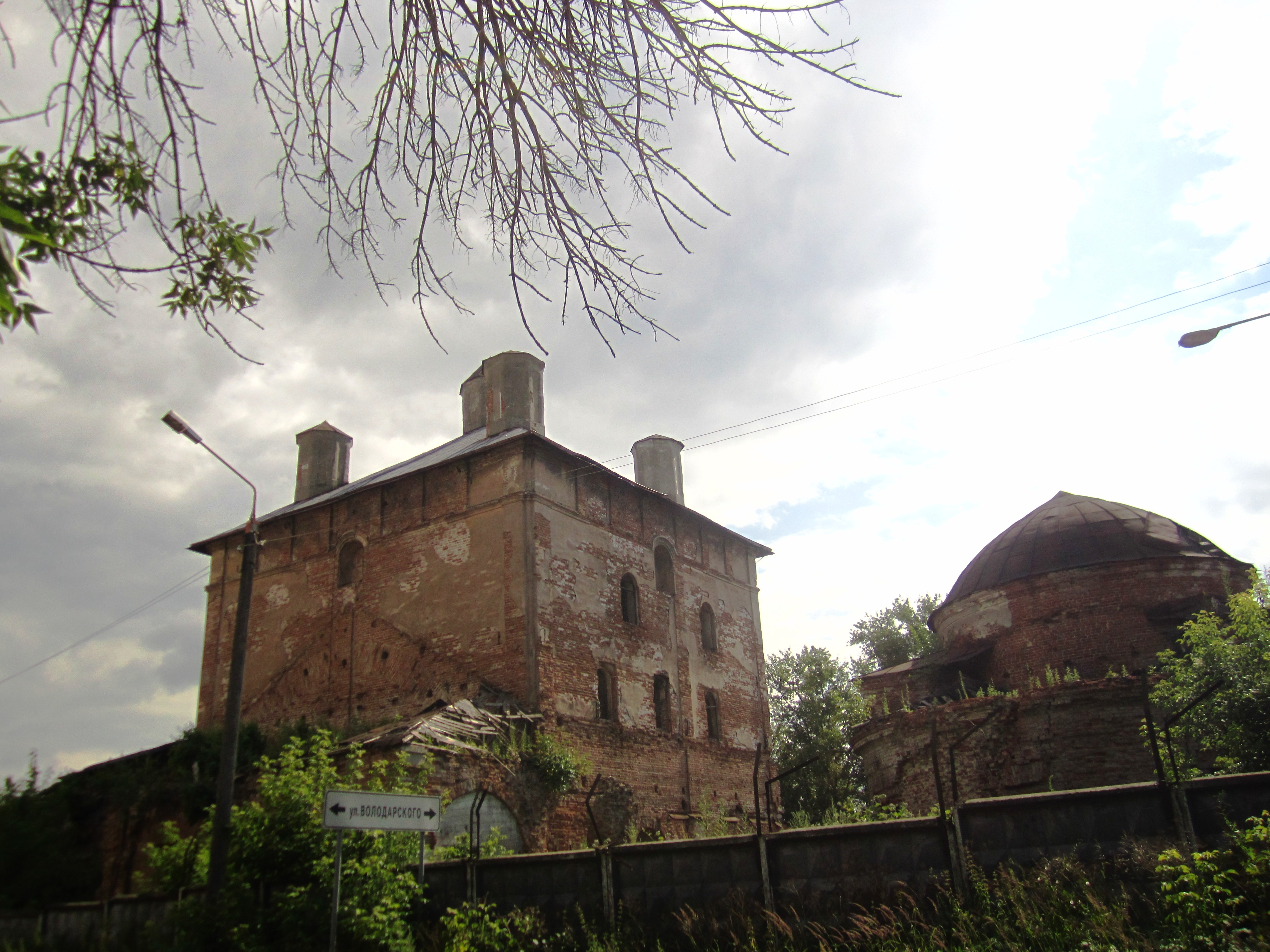 Церковь Воздвижения Животворящего Креста Господня: улица Ситценабивная, 15, Серпухов, Московская область